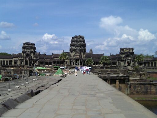 平成18年5月 投稿者撮影